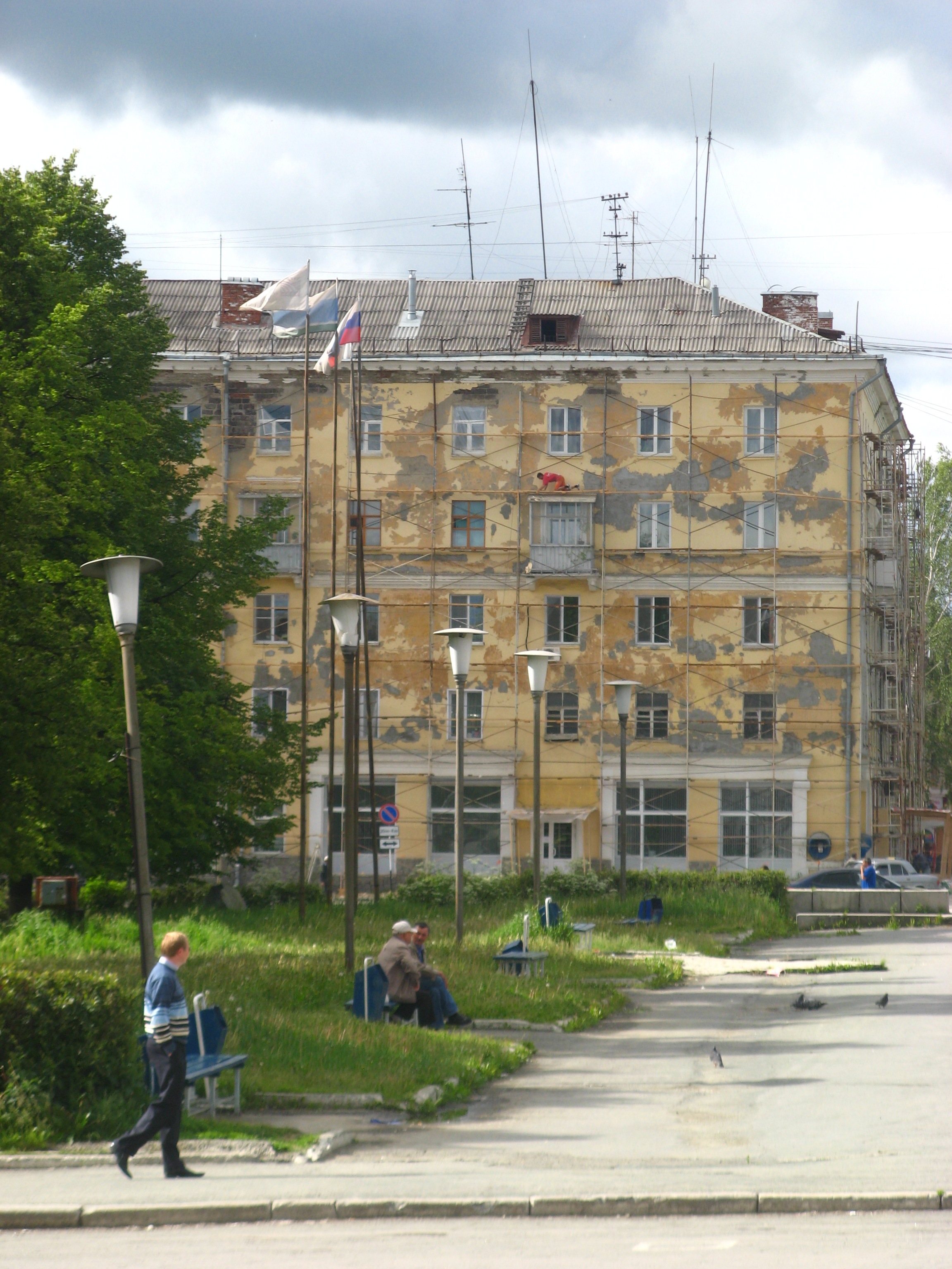 Первоуральск. Центральная площадь.